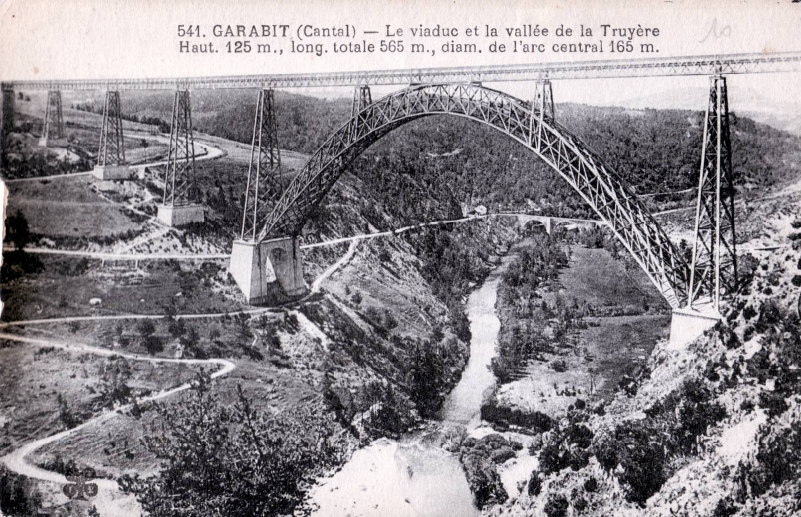 Carte postale ancienne éditée par CCCC MTIL n°541 : GARABIT - Le viaduc et la vallée de la Truyère. Haut. 125 m., long. totale 565 m., diam. de l'arc central 165 m.